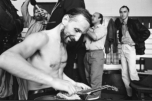 портрет, Мамонов, Пётр Николаевич, группа Звуки Му